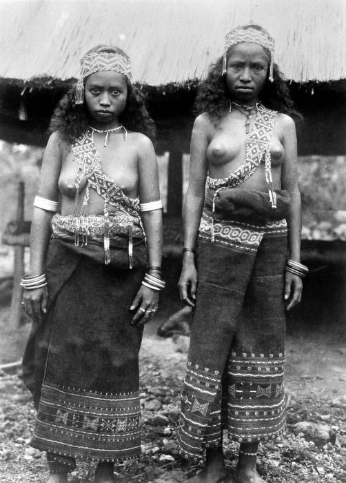 Repronegatief. Twee vrouwen van het hoofd van Worbain in dansuitrusting